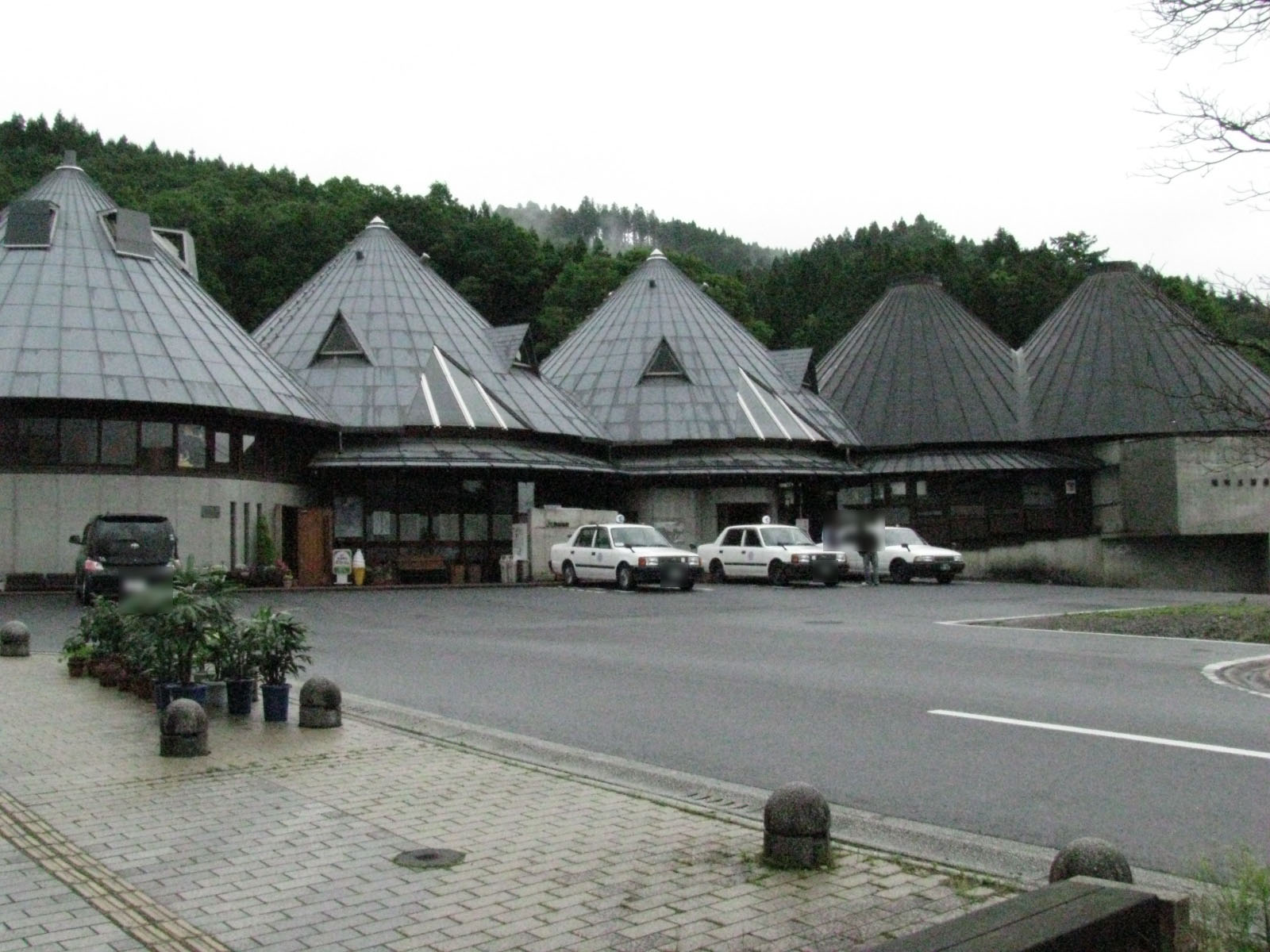 JR水郡線磐城塙駅